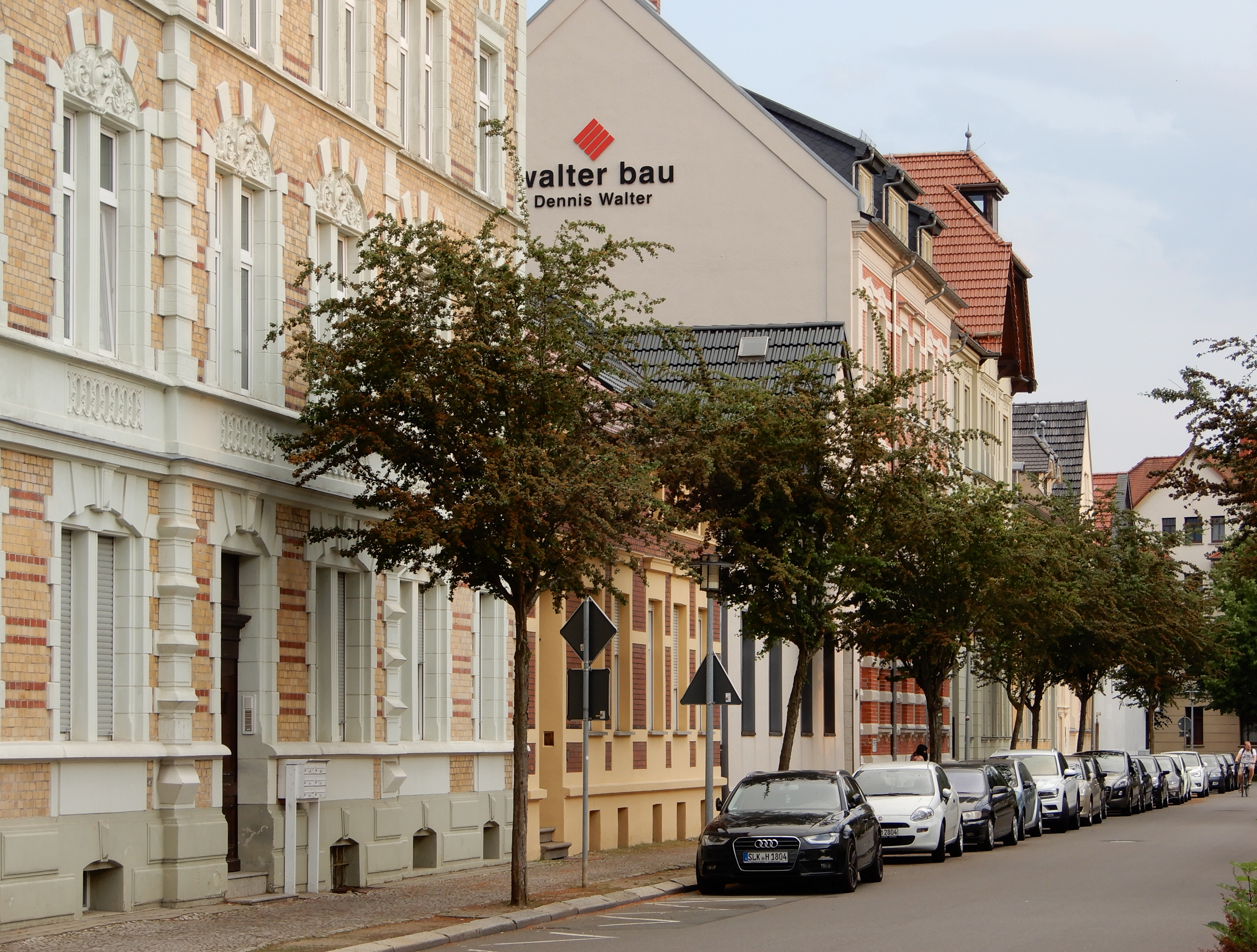 Gebäude Leopoldstraße 1-6 in Aschersleben